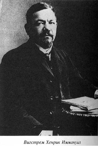 Хенрик Вингстрём (1862-1923), финский ювелир